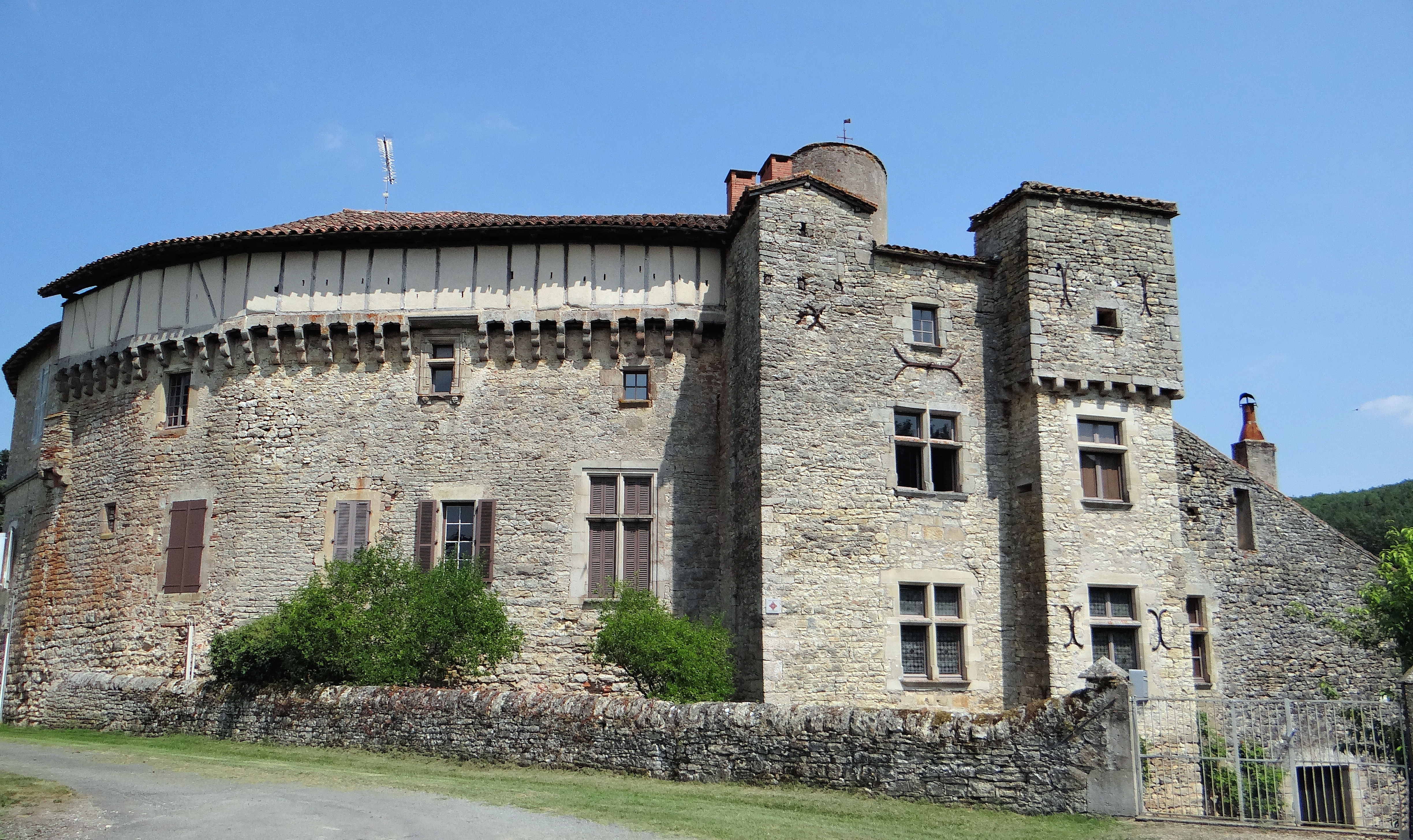 Château de Féneyrols